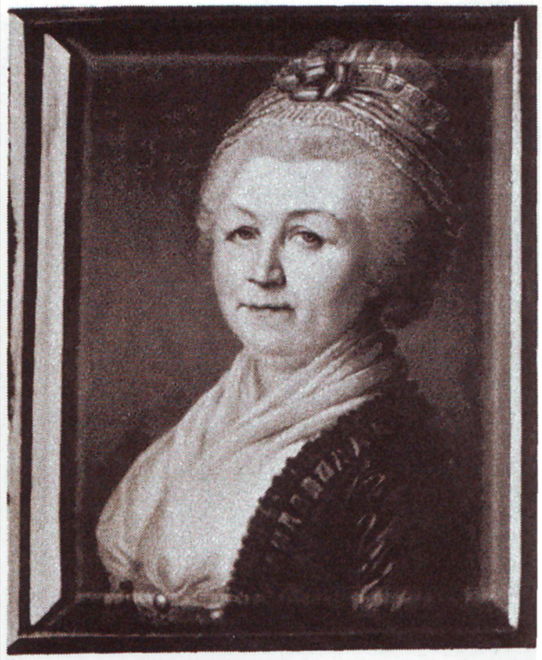 Перекусихина Мария Саввишна (1739-1824)